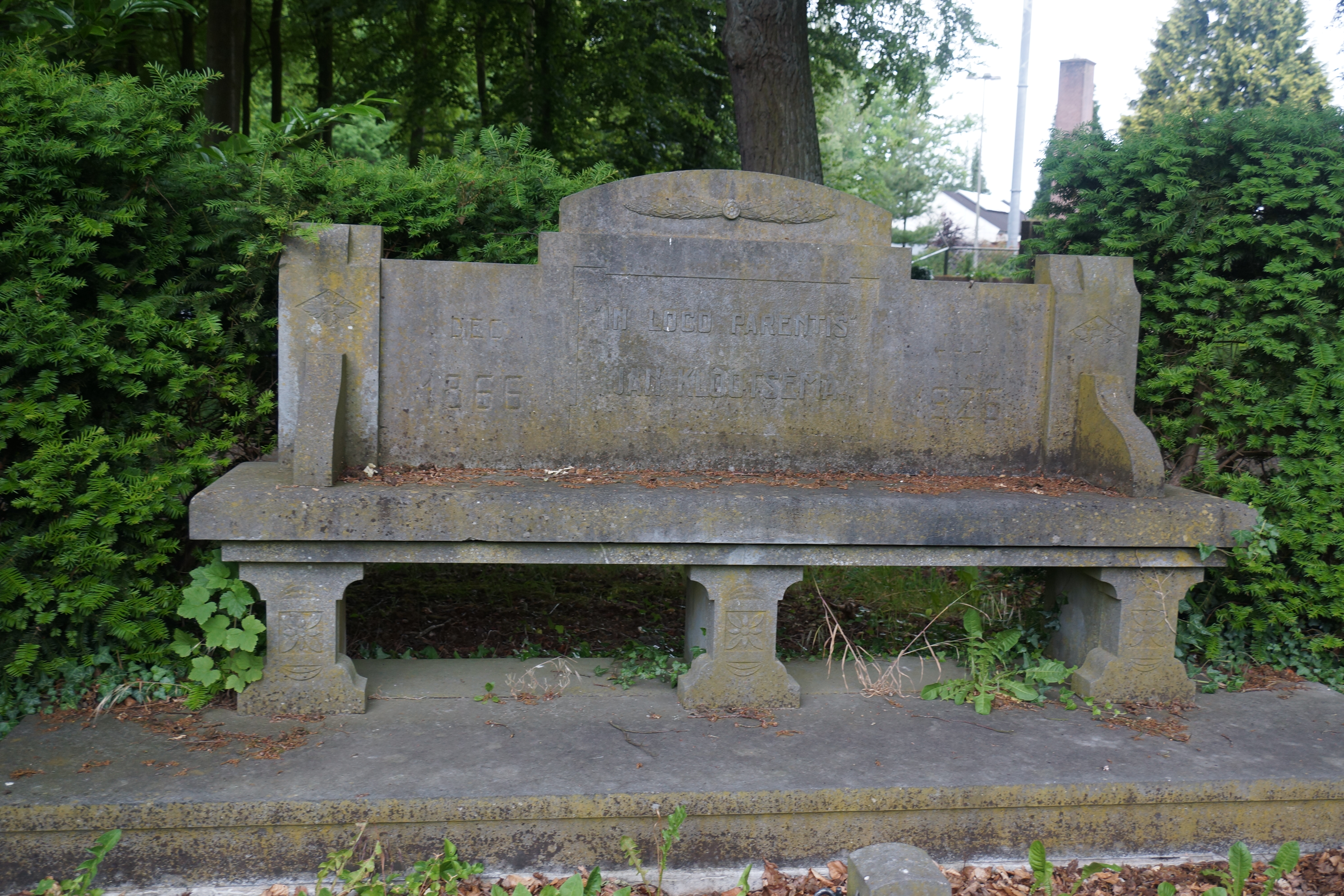 Kruisberg Doetinchem Klootsemabank 150614 (26)